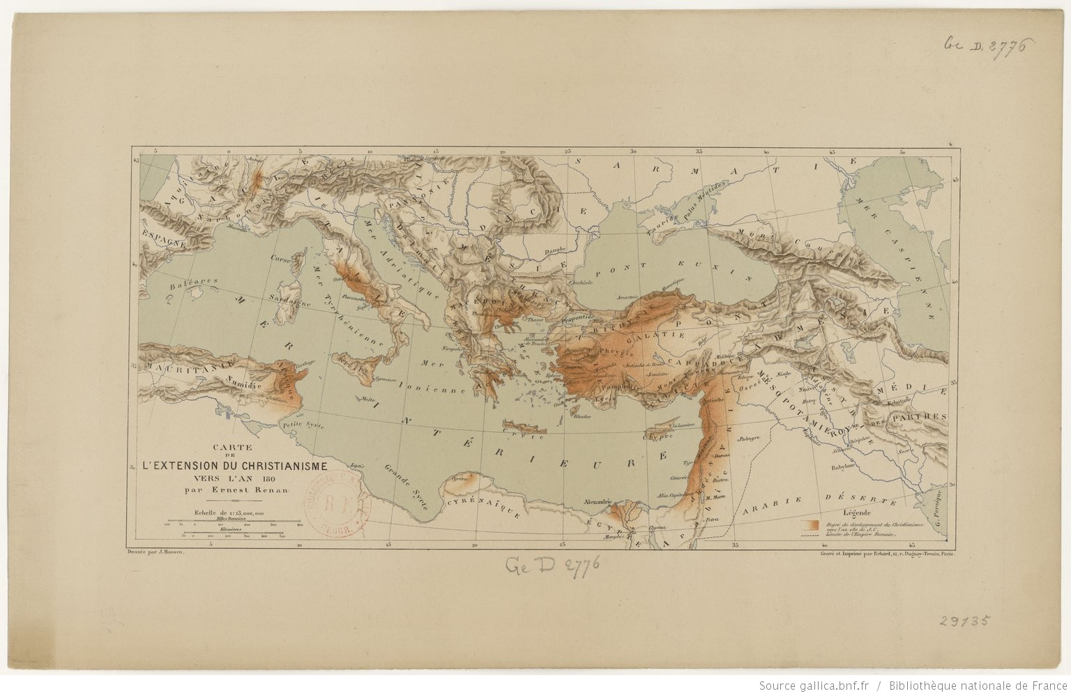 Mapa de la extensión del cristianismo hacia el año 180. Ernest Renan. 1883.